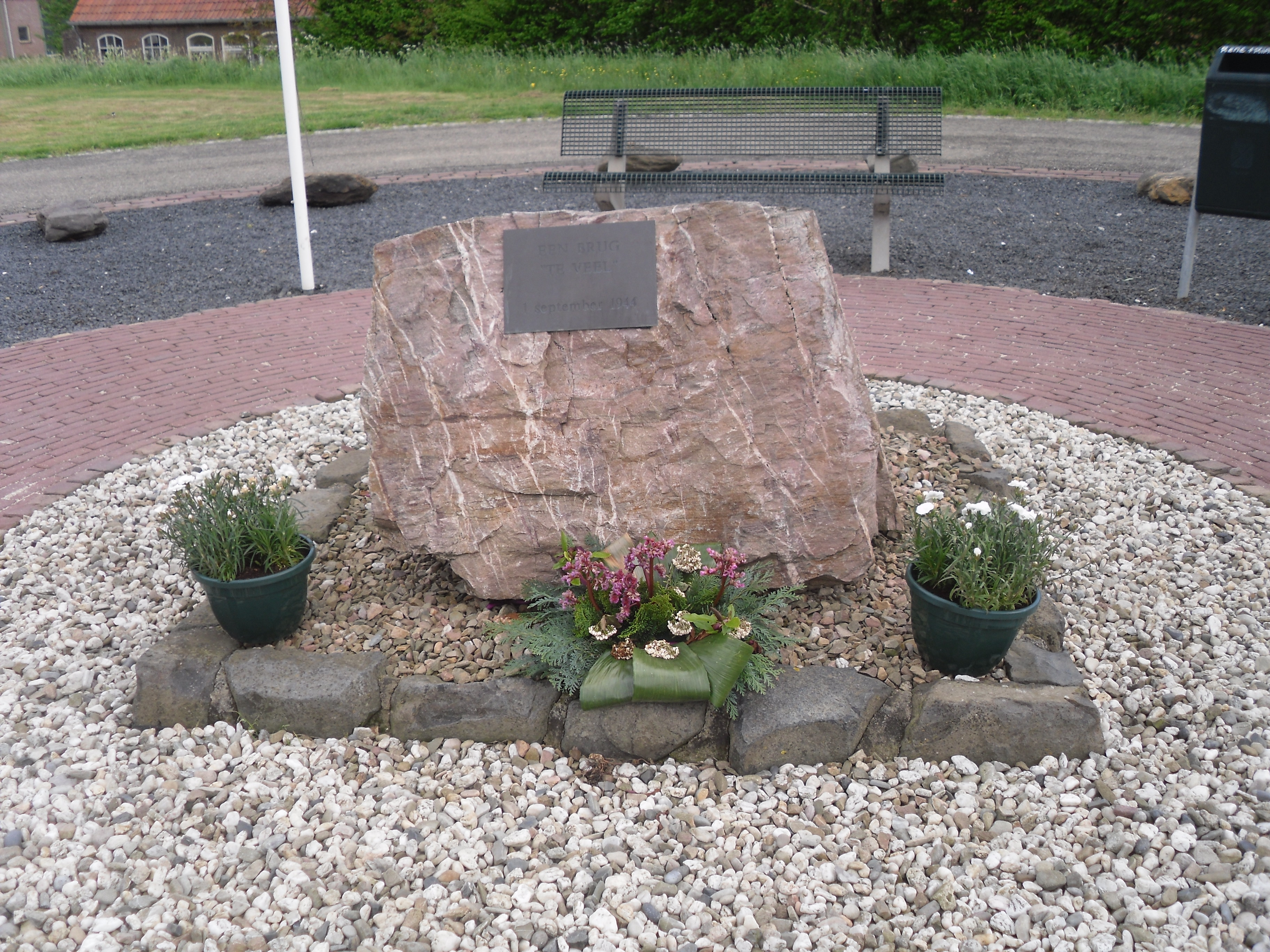 Monument WOII "Een brug te veel" Maasbandijk 66, 6606KE, Niftrik NL